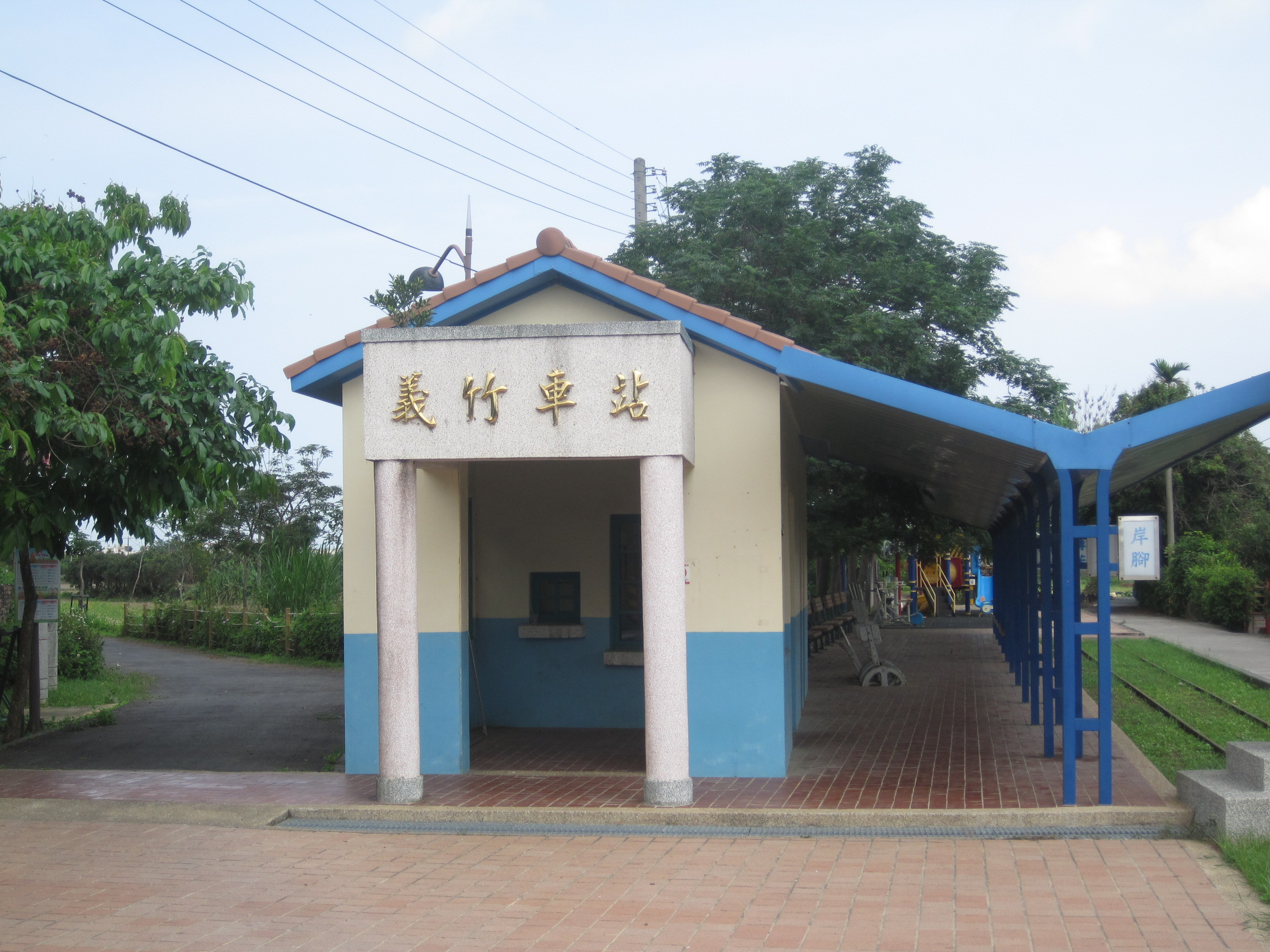 糖鐵布袋線義竹車站整修後的樣子